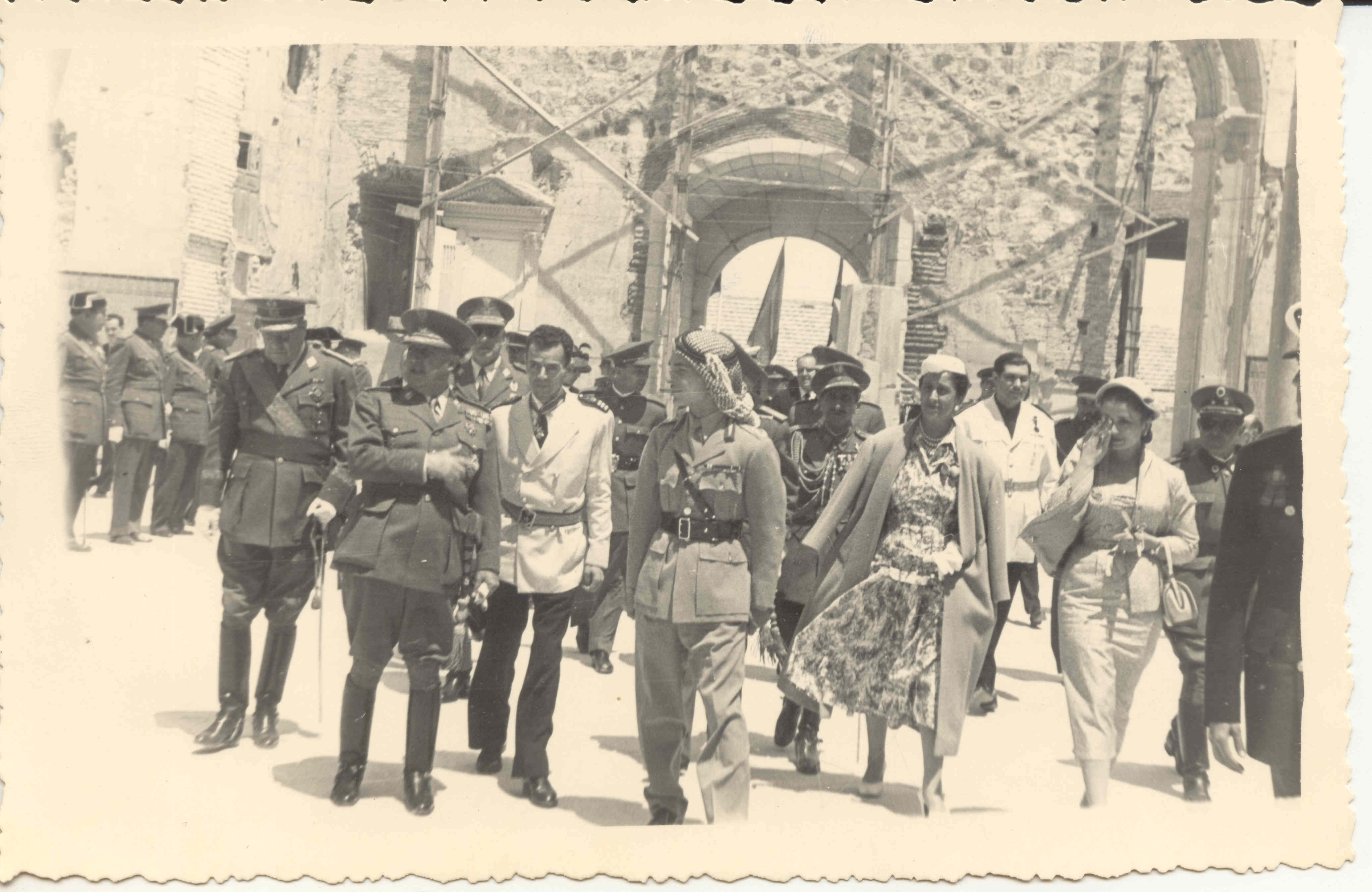 Franco y Moscardó acompañan al rey Hussein de Jordania en su visita al alcazar de Toledo en ruinas. 1954